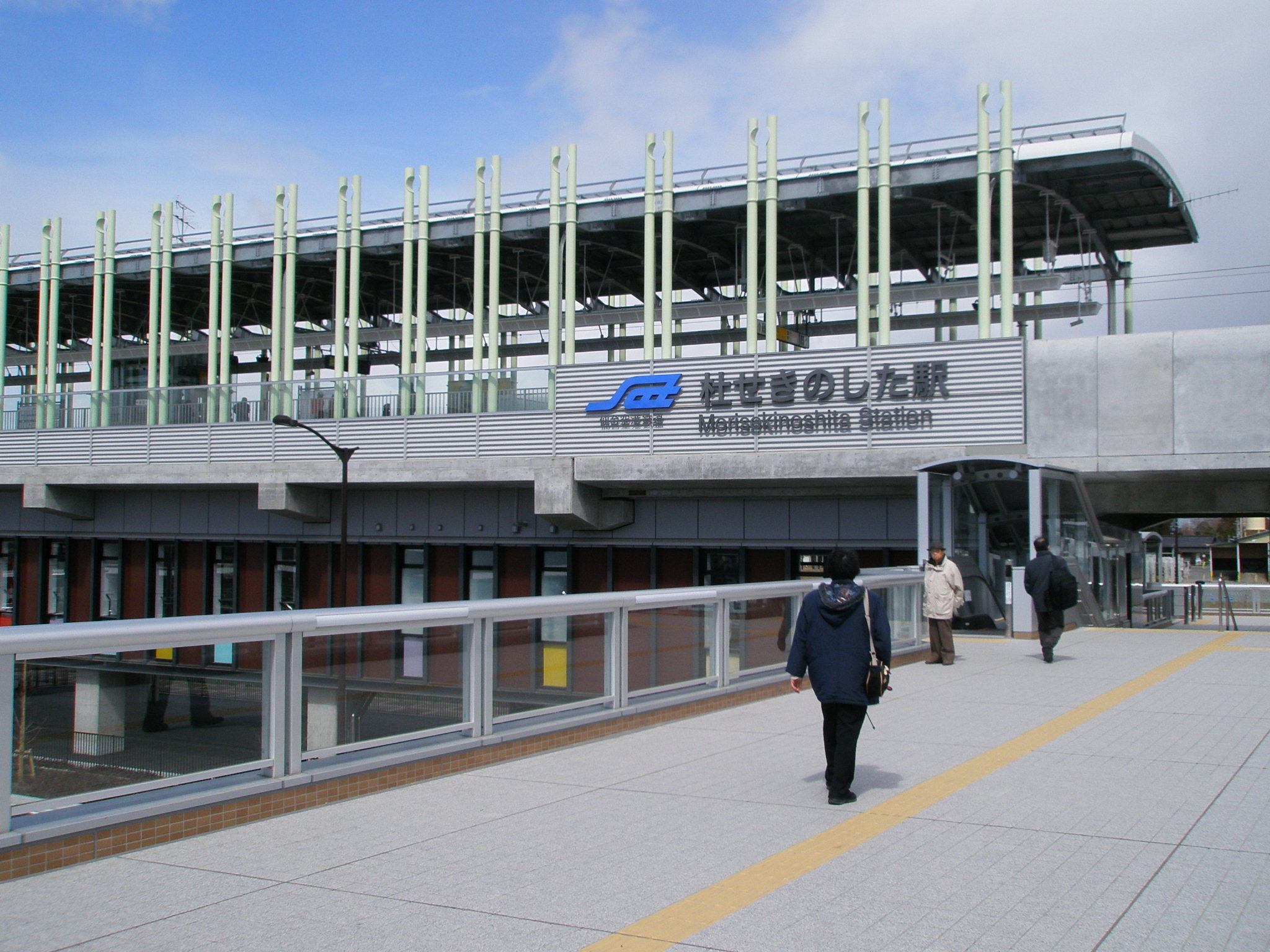 仙台空港アクセス鉄道・杜せきのした駅外観。南口側より